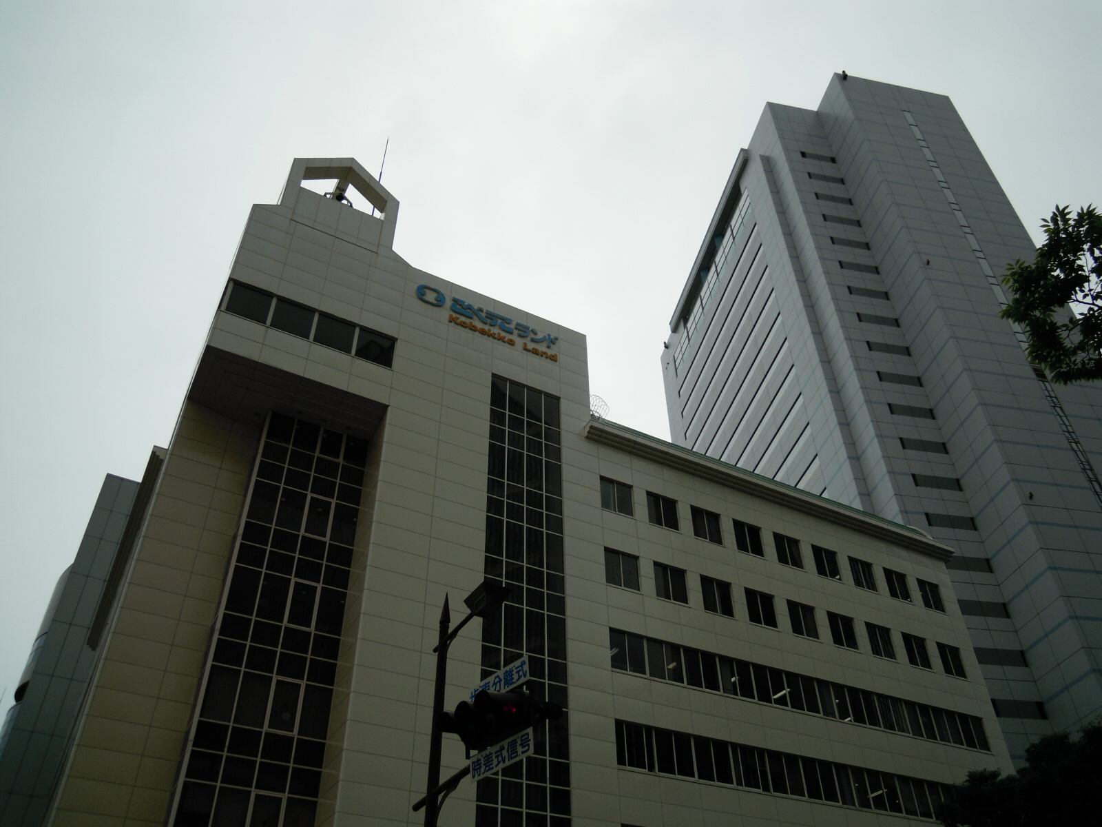 Kobekko Land